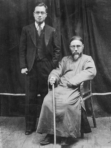 中文（香港）: 錢基博和錢鐘書合影